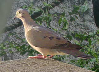 Tórtola Torcaza, tomada en Providencia, Santiago de Chile (Zenaida auriculata)